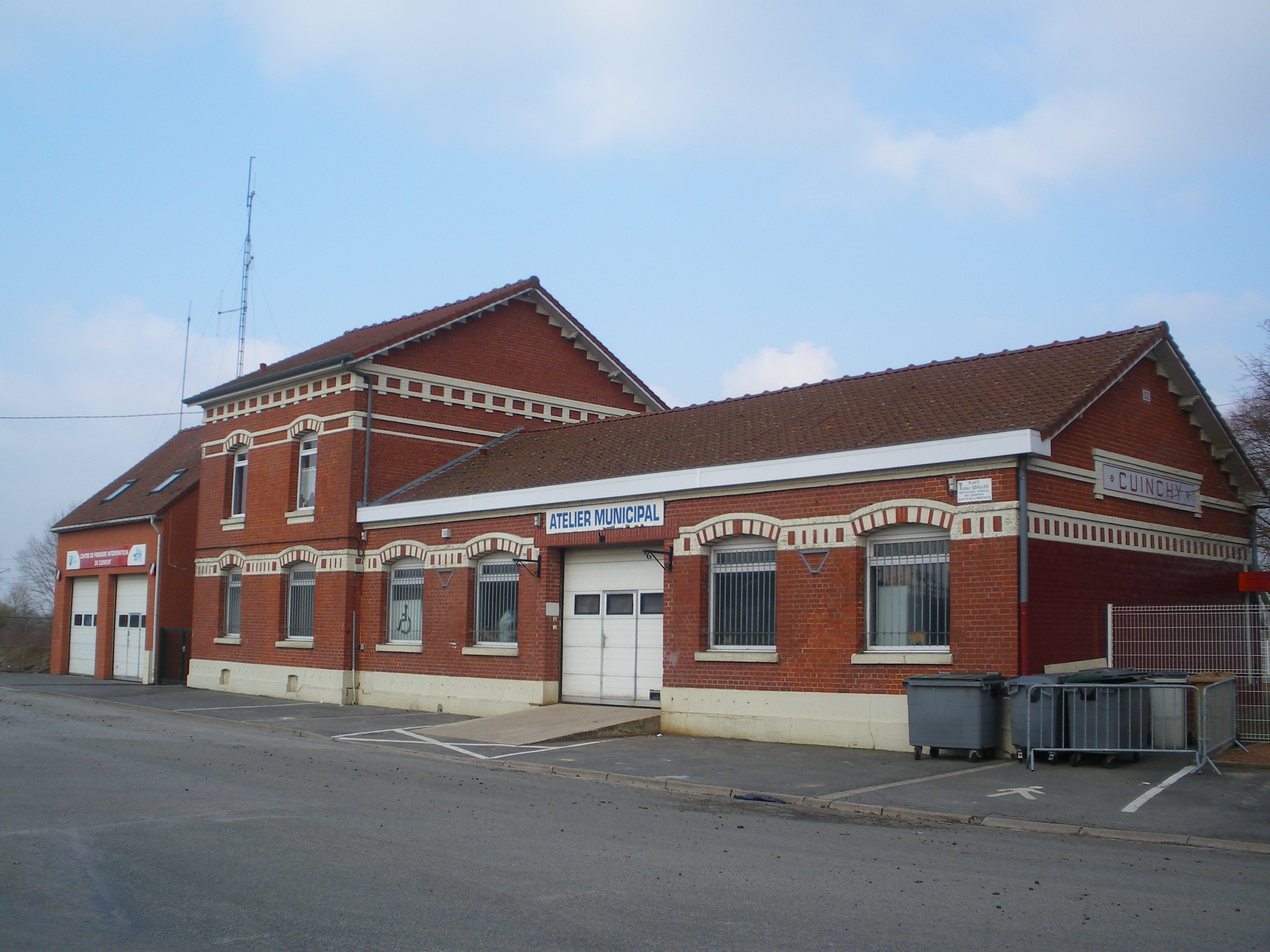 Vue de l'ancienne gare de Cuinchy, devenue atelier municipal.